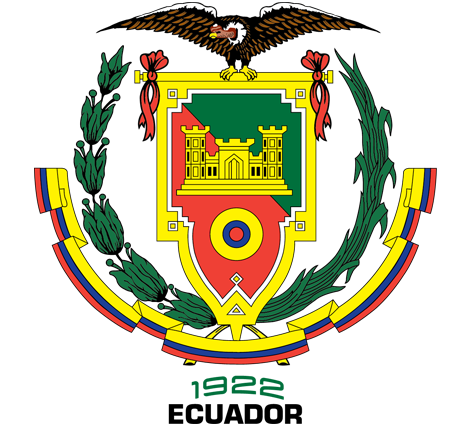 Logo Universidad de las Fuerzas Armadas ESPE